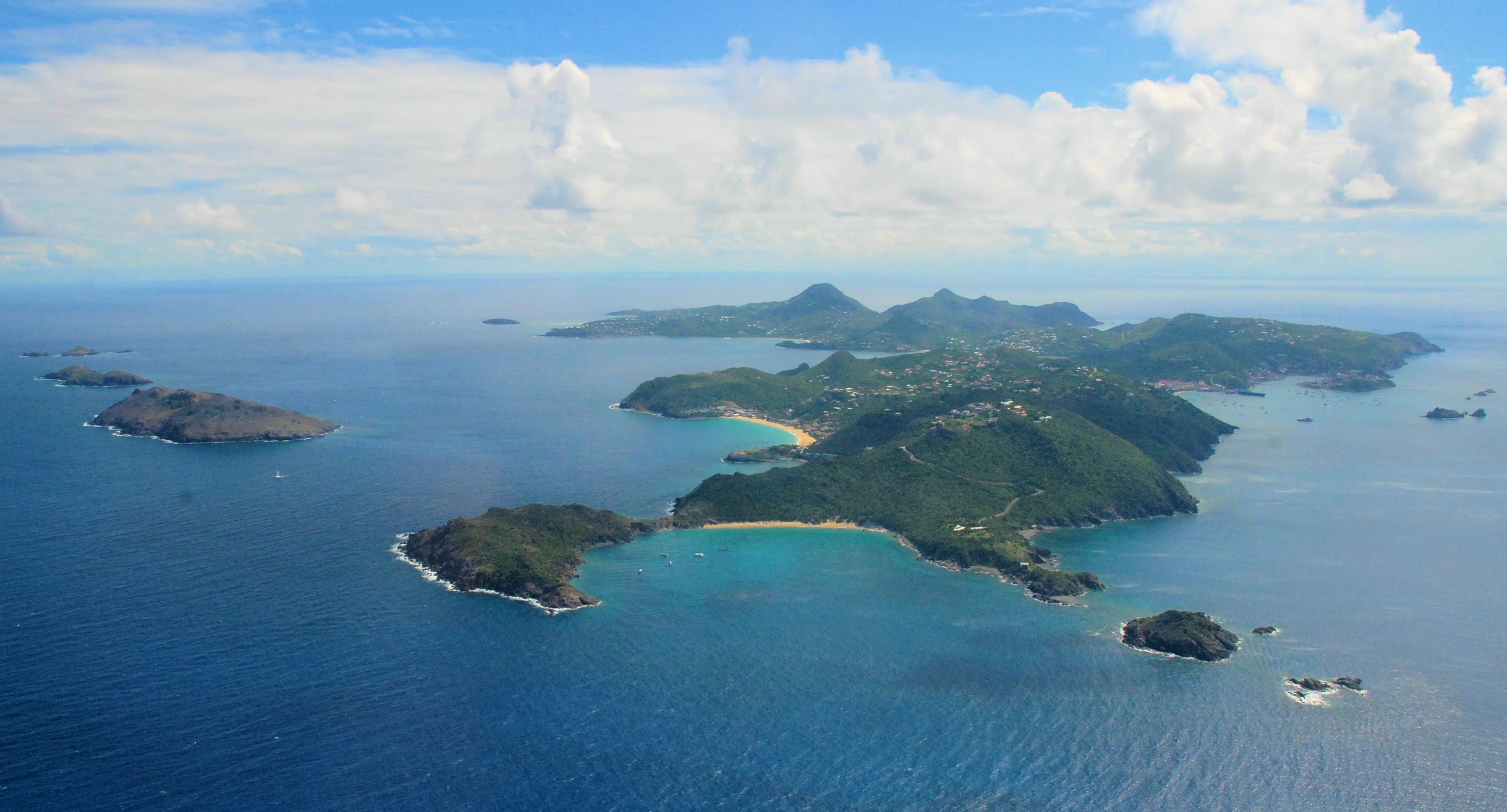 Saint Barth - Vue aérienne - Octobre 2009